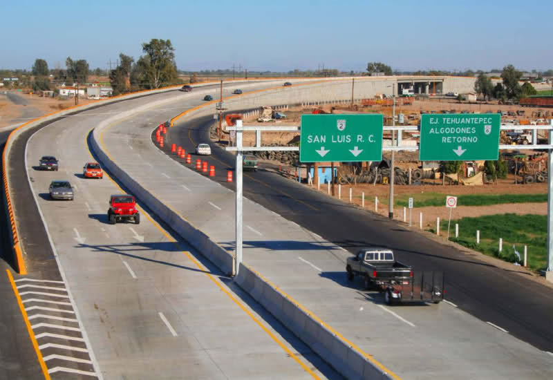 Construcción del Puente del Ejido Tehuantepec